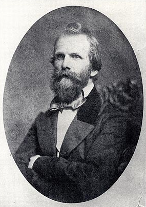 Portrait of Hammatt Billings.